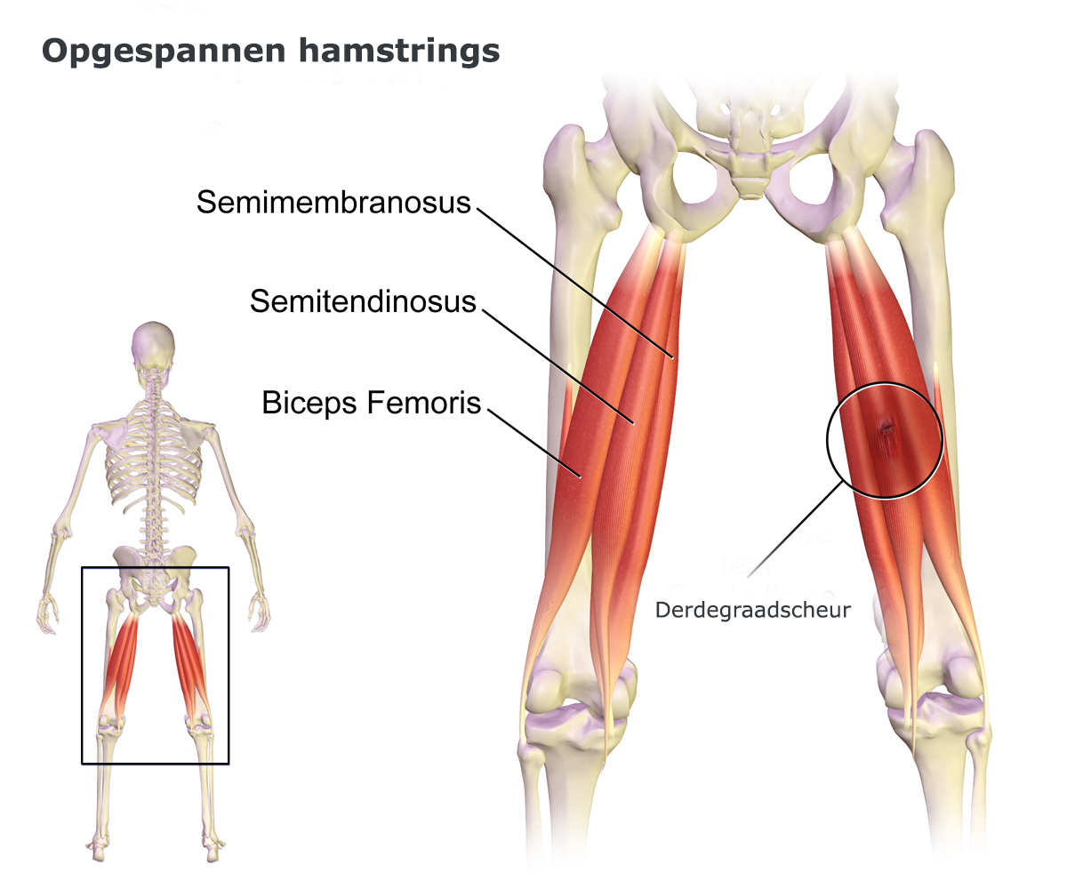 Opgespannen hamstrings